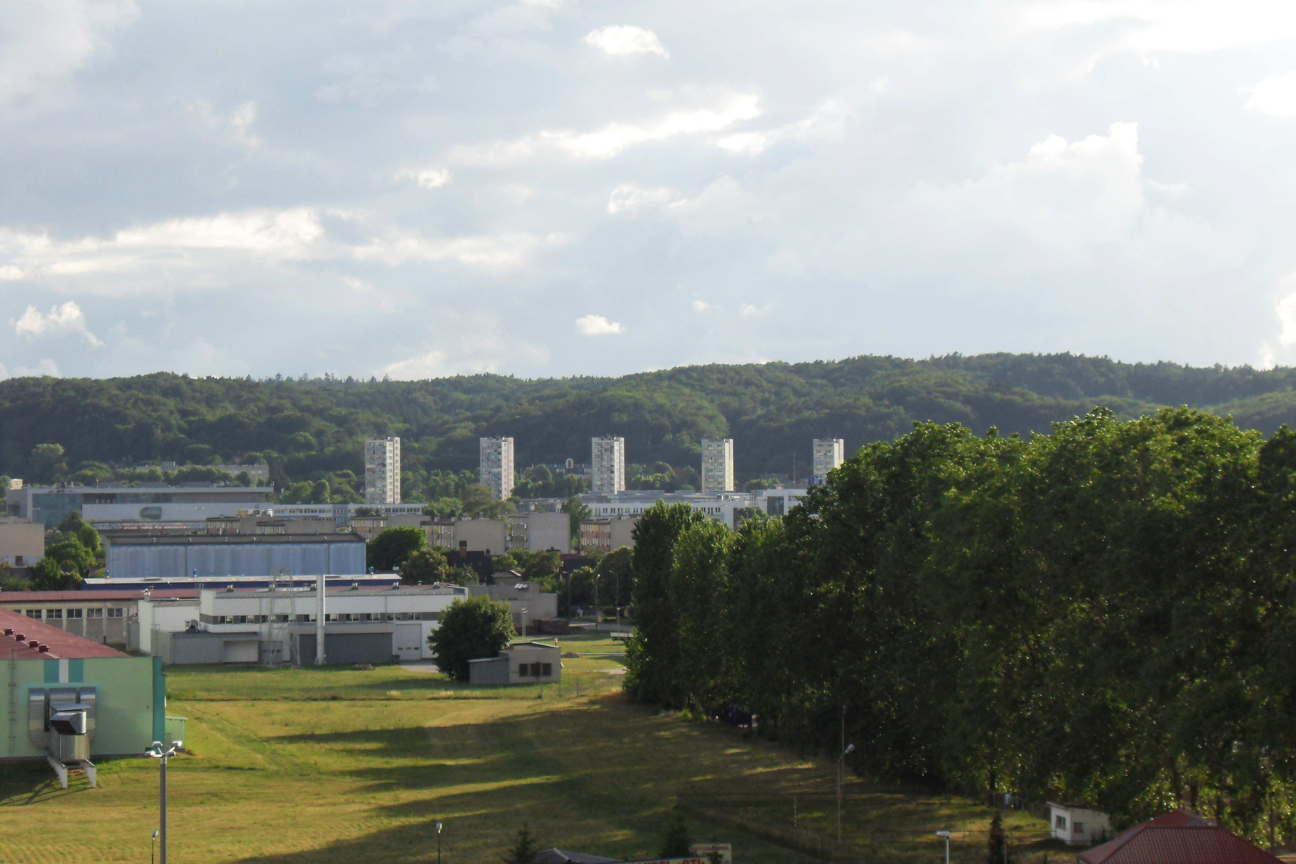 Gdańsk. Wieżowce przy ul. Wita Stwosza (Oliwa) i Lasy Oliwskie. Na pierwszym planie Przymorze Małe.